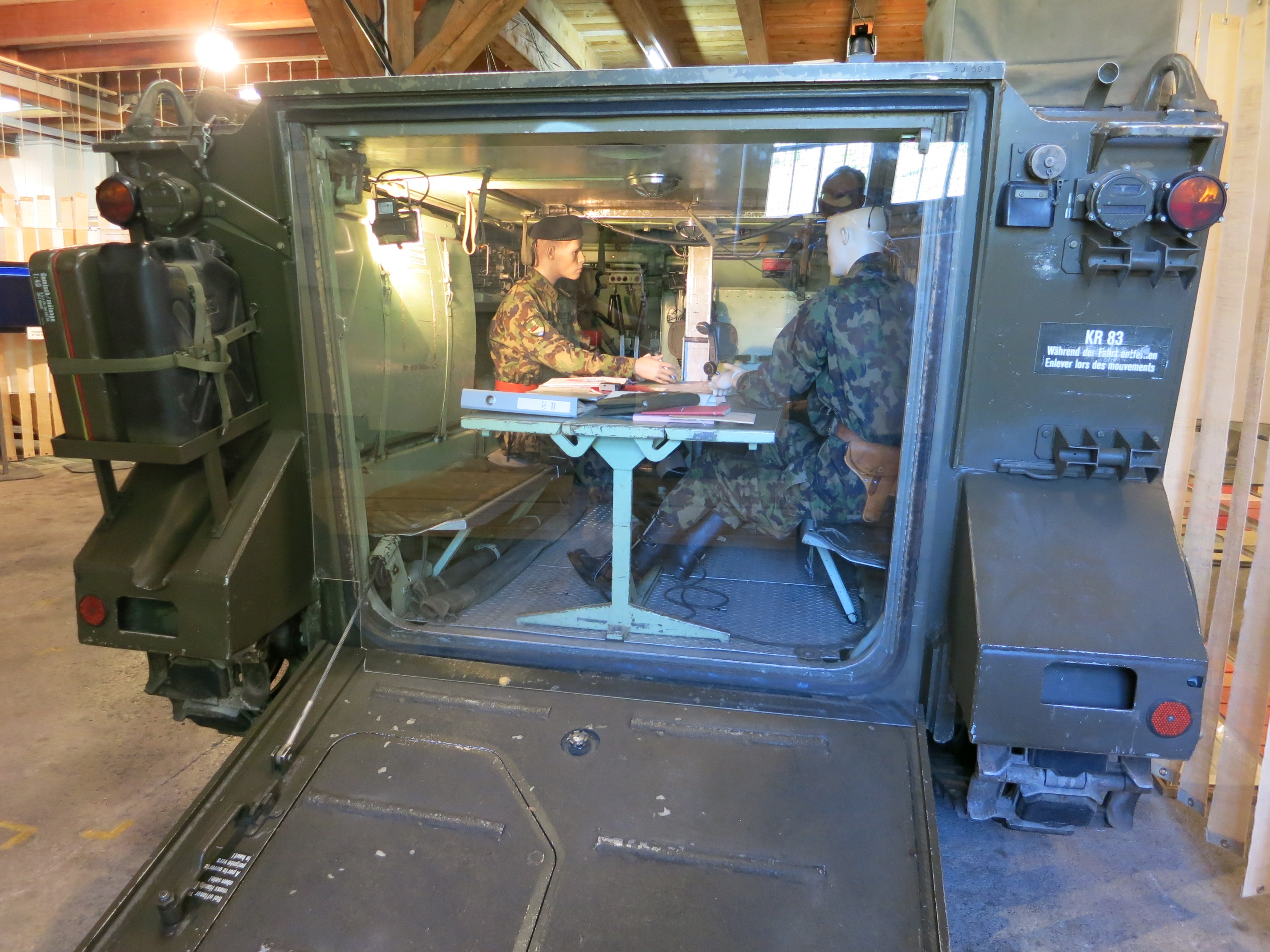 Museum im Zeughaus, Schaffhausen SH, Schweiz